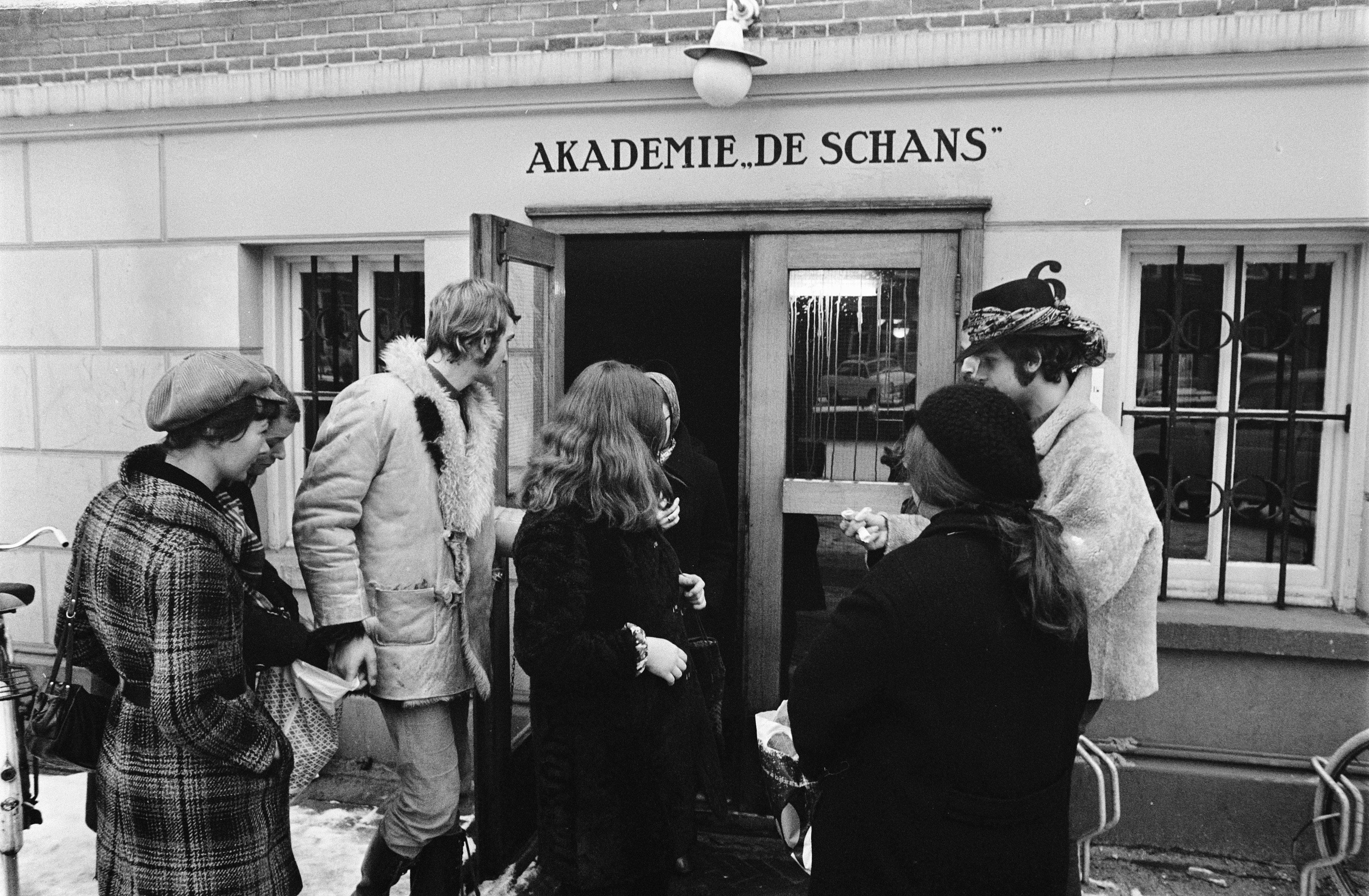 Collectie / Archief : Fotocollectie Anefo Reportage / Serie : [ onbekend ] Beschrijving : Leden van de aktiegroep "Dolle Mina" delen voorbehoedsmiddelen uit aan leerlingen van Academie "De Schans" te Amsterdam Datum : 19 februari 1970 Locatie : Amsterdam, Noord-Holland Trefwoorden : academies, aktiegroepen, leerlingen, voorbehoedsmiddelen Fotograaf : Evers, Joost / Anefo Auteursrechthebbende : Nationaal Archief Materiaalsoort : Negatief (zwart/wit) Nummer archiefinventaris : bekijk toegang 2.24.01.05 Bestanddeelnummer : 923-2709